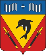 Герб Видяево